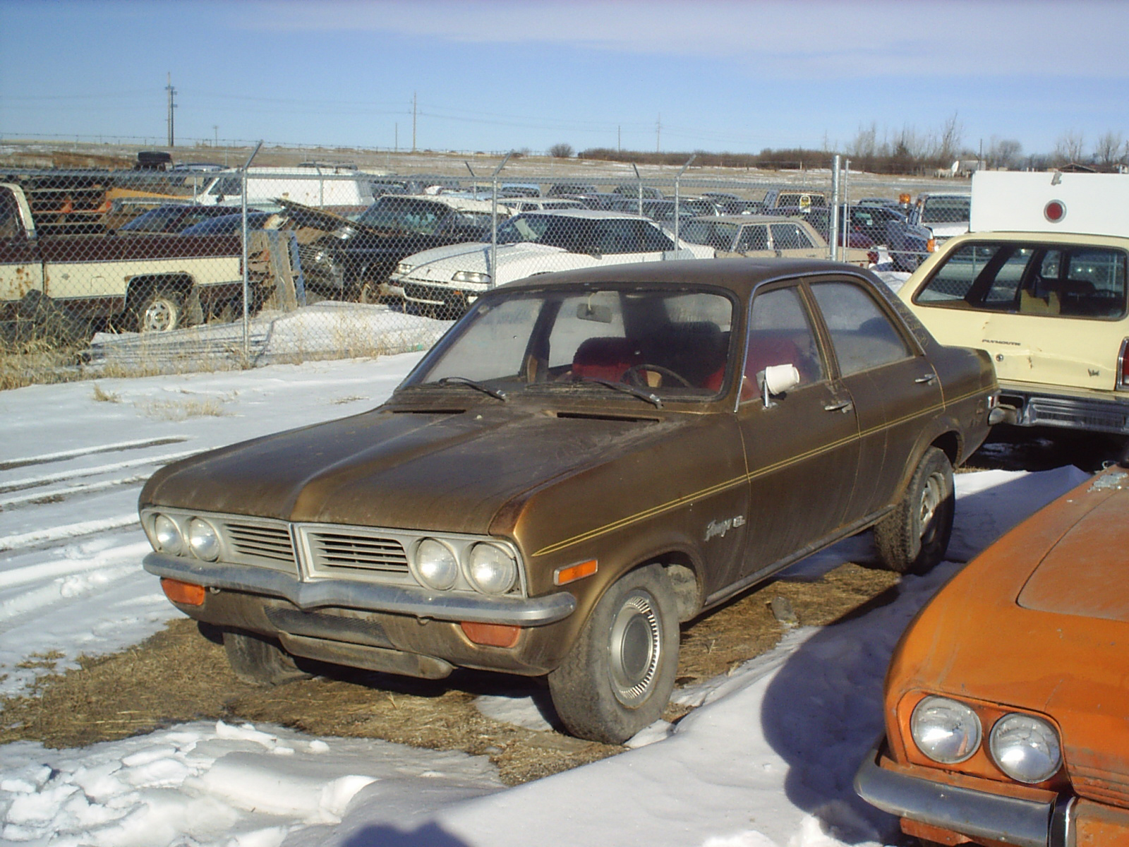 A friend's 1972 Vauxhall Firenza